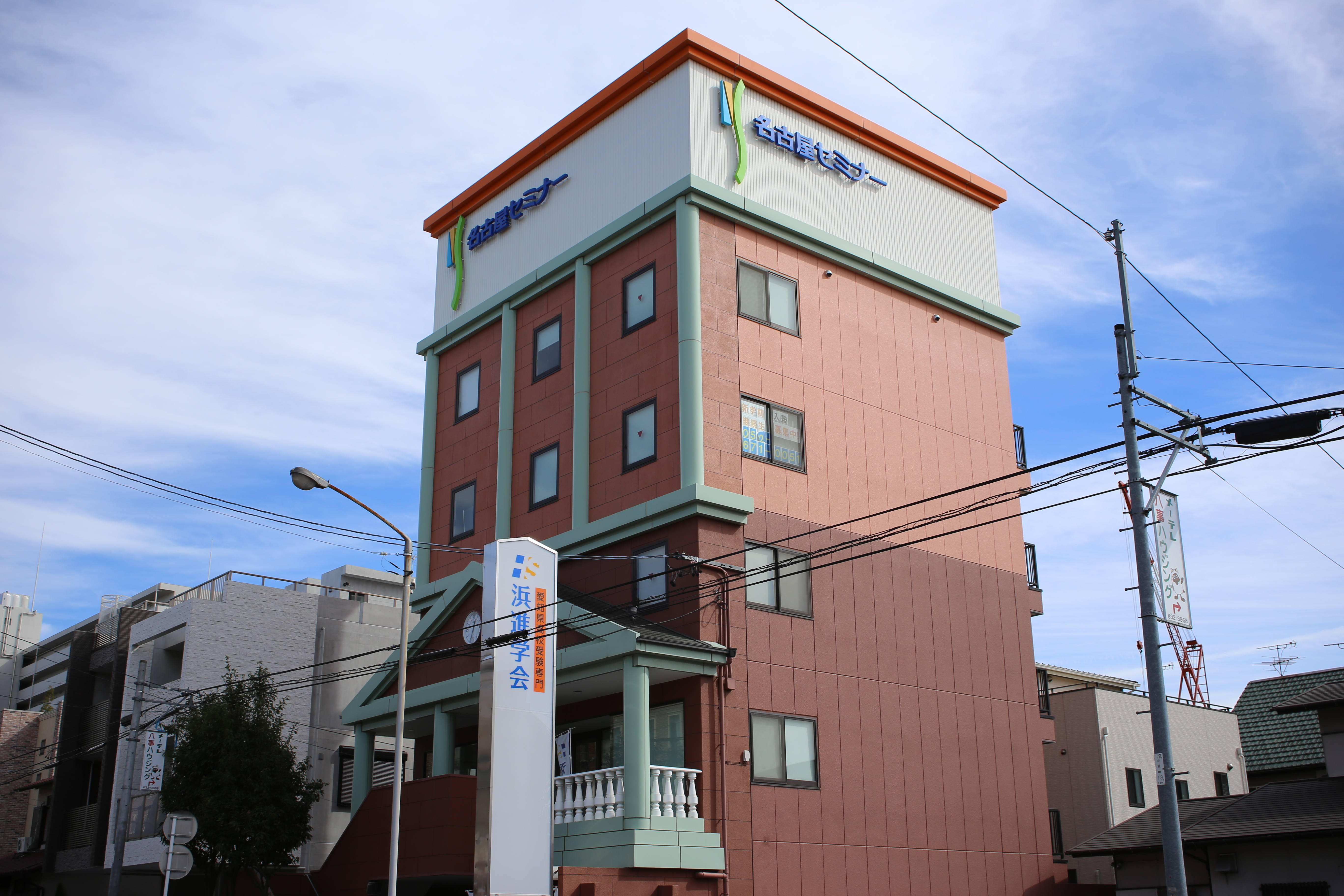 名古屋市昭和区滝川町の名古屋セミナー本社を北側公道西側より撮影